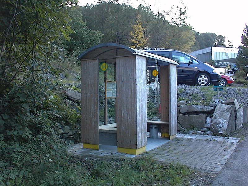 ein typisches Buswartehaus im Bregenzerwald (hier: Alberschwende, GH Hirschen (Wäldergarage))